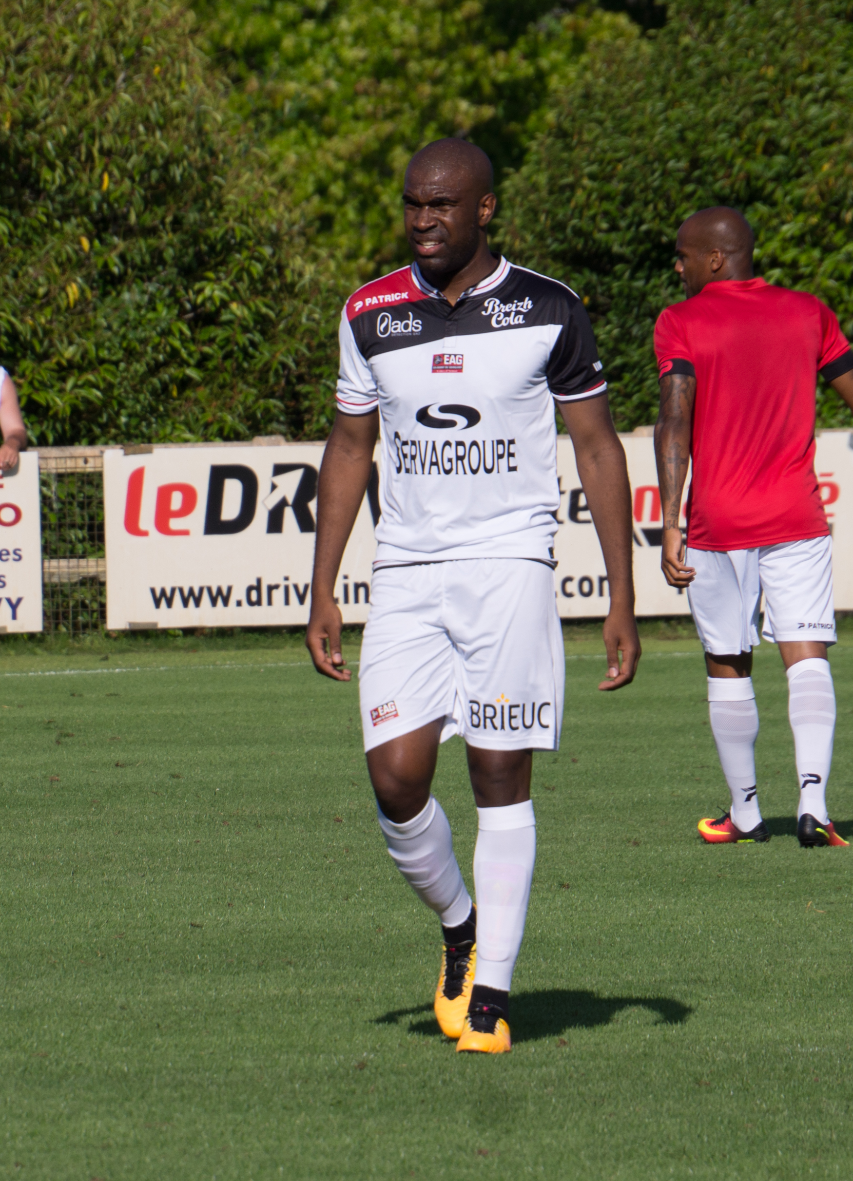 Sloan Privat le 24 juillet 2016